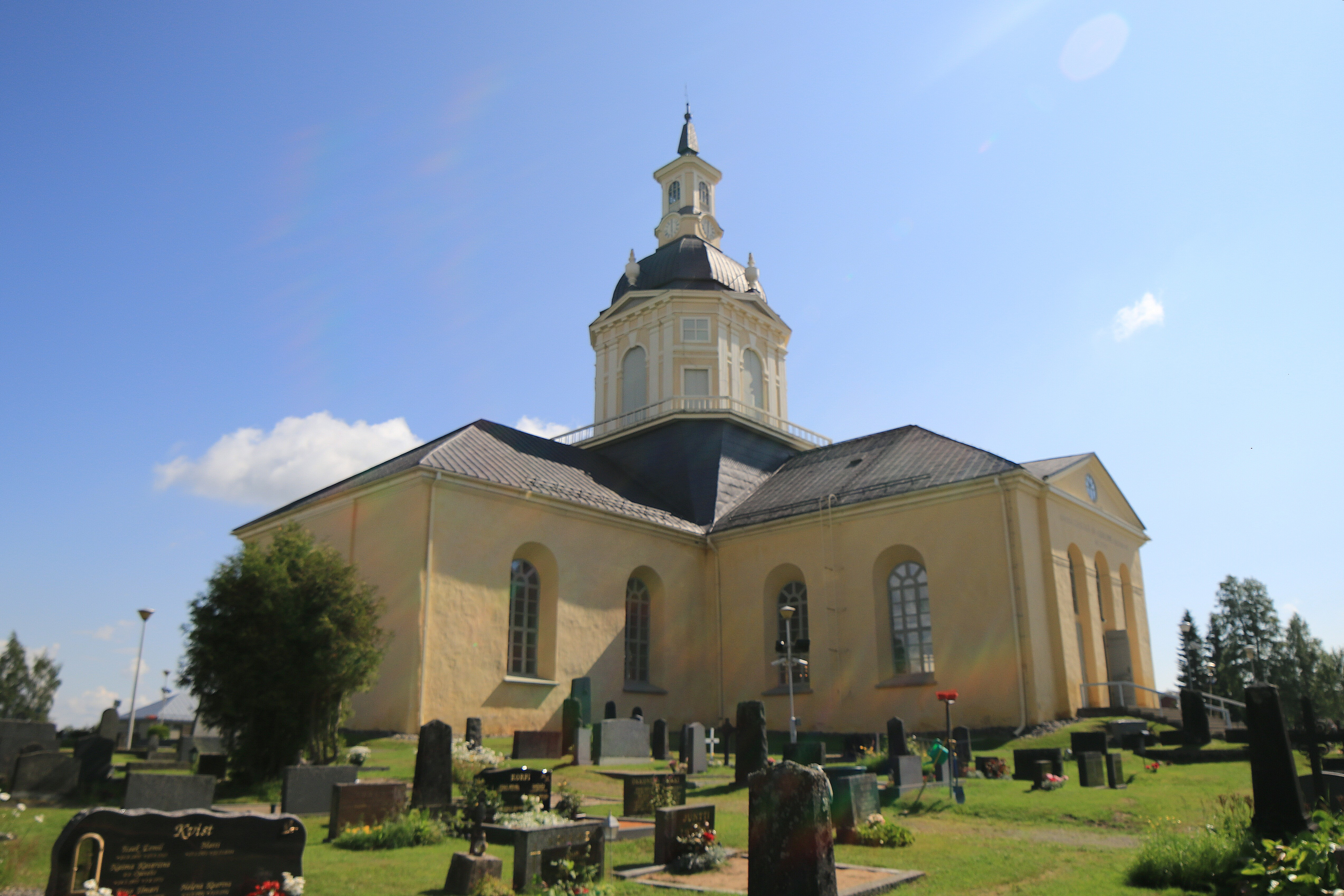 Alatornion kirkko.